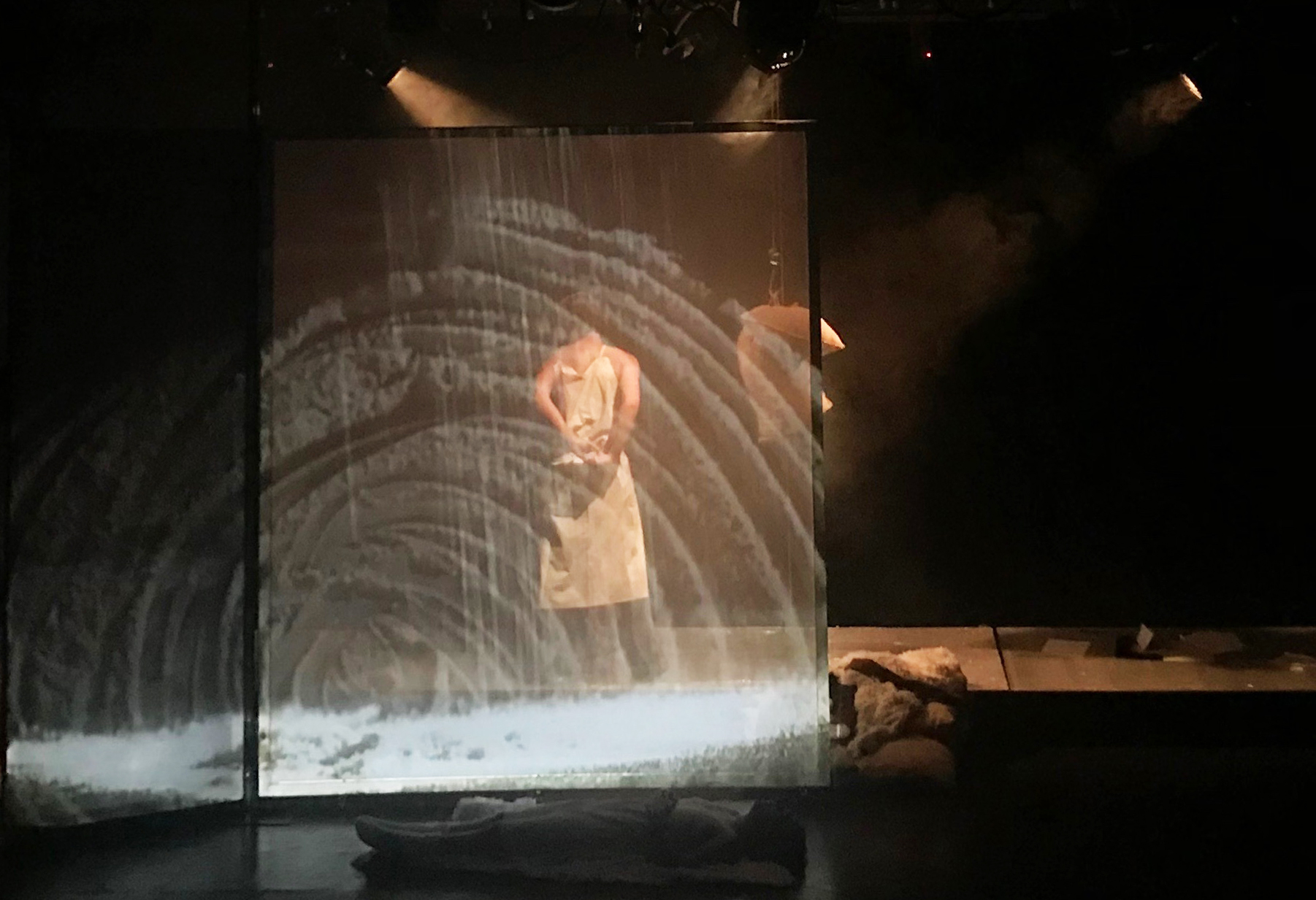 Noževi u kokoškama- Atelje 212,2019